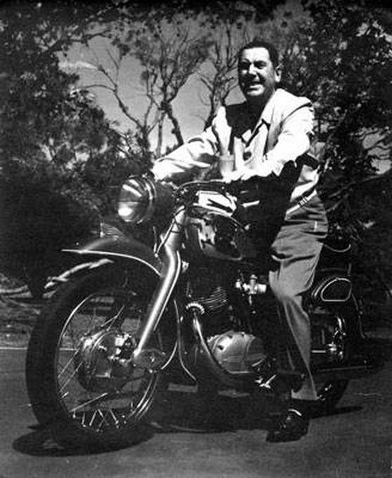 General Perón à moto